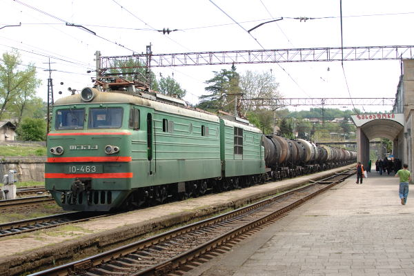 10-463 (ВЛ10-463) der Sakartwelos Rkinigsa in Sestaponi